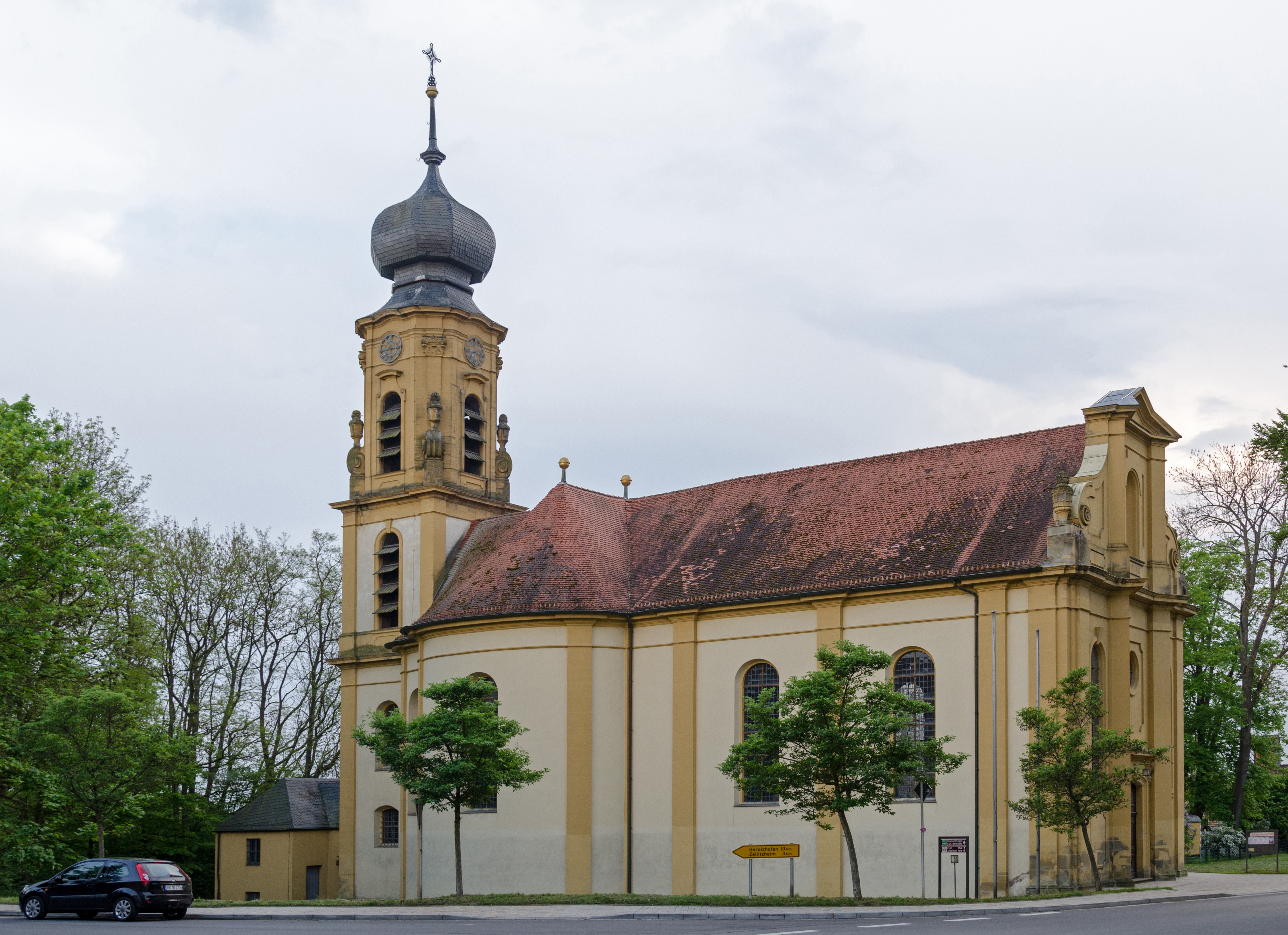 Pfarrkirche Zur heiligsten Dreifaltigkeit in Gaibach